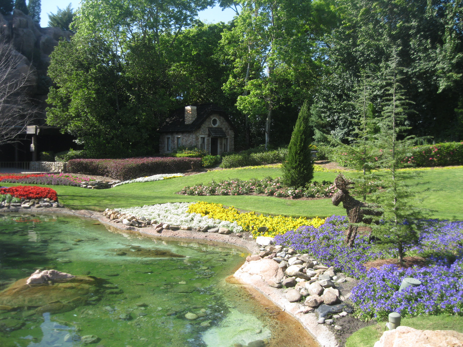 WONDER NATURE-WALT DISNEY WORLD